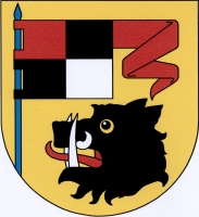 Buzice, znak. Ve zlatém štítě černá kančí hlava se stříbrnou zbrojí a červeným jazykem pod červeno-černo-černo-stříbrně čtvrceným praporcem s červeným ocasem a vpravo vyrůstající modrou žerdí.